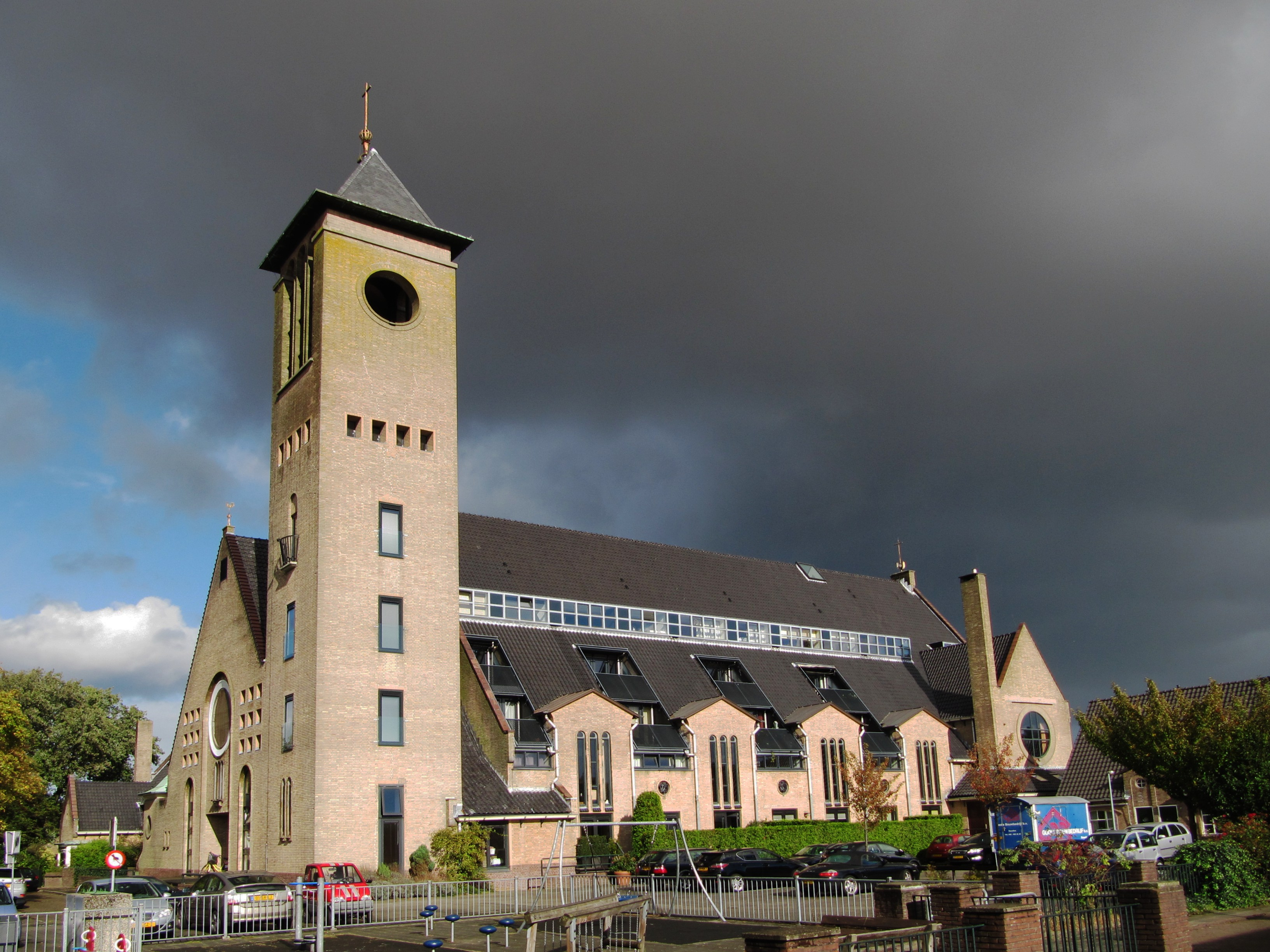 RM522738 Hilversum - Pelikaanstraat 32 (foto 1).jpg